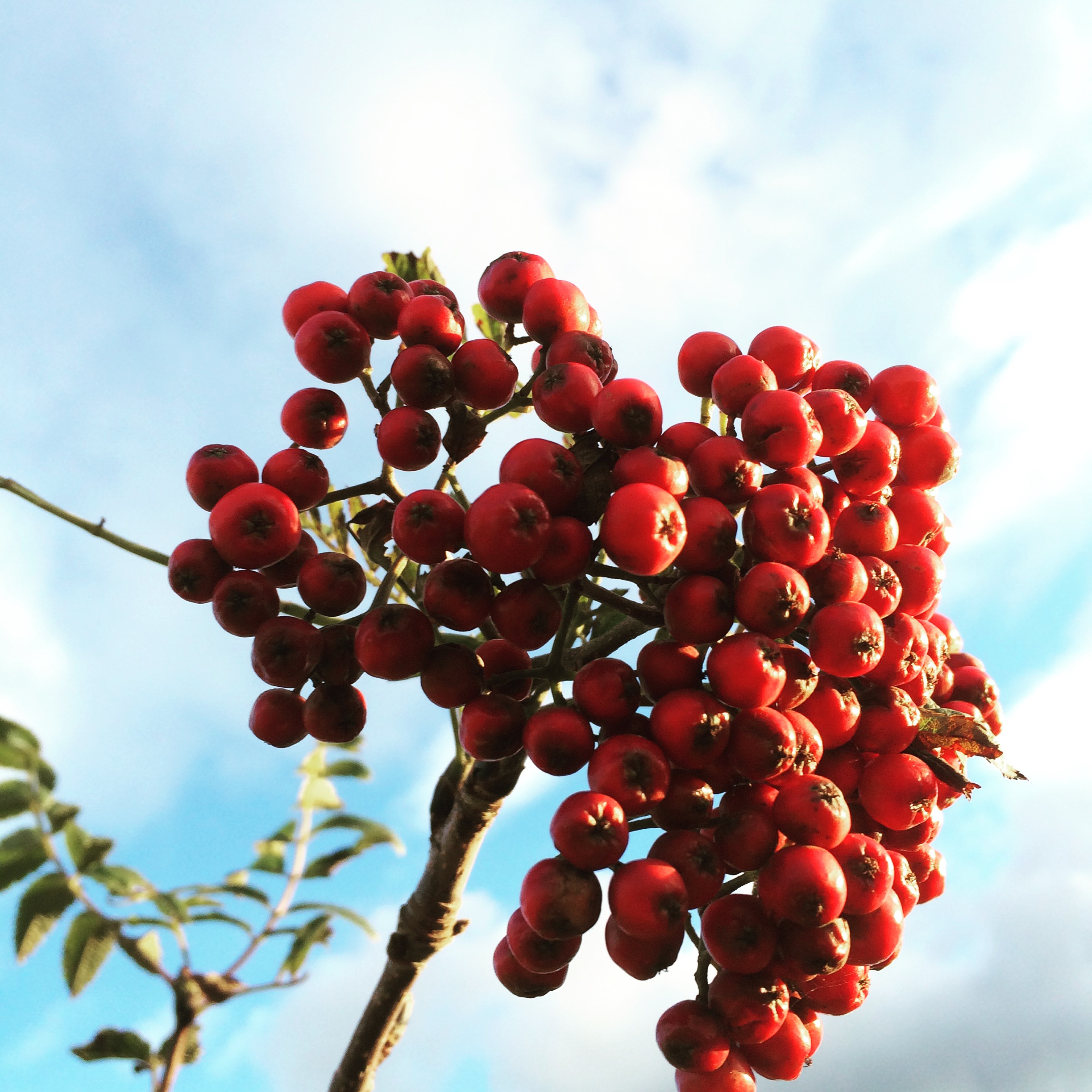 Criawol ar Fynydd Merthyr, rhwng Merthyr a Chwmbach.